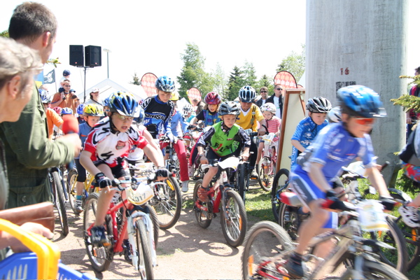 Fahrrad-Spartakiade Sachsen